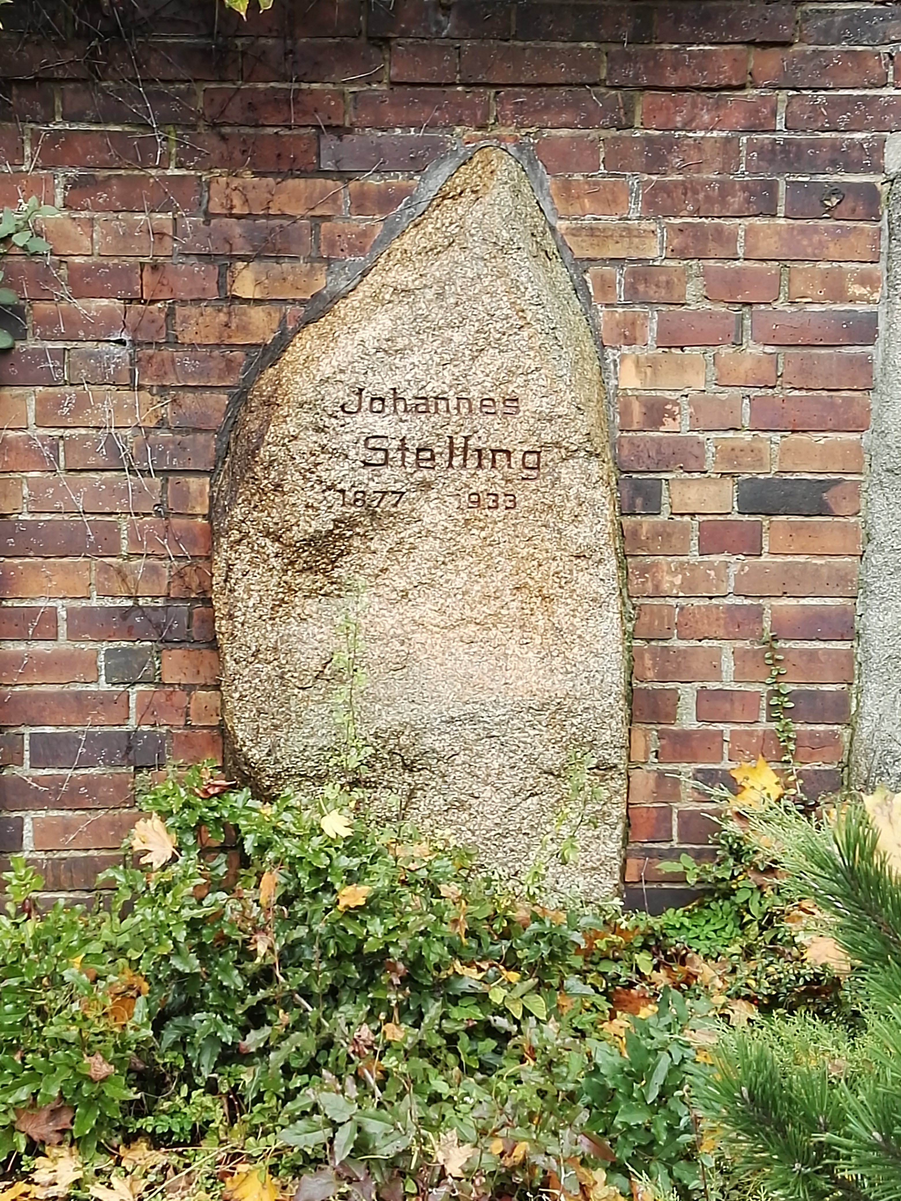 Grab von Johannes Stelling in der Gedenkstätte der Sozialisten auf dem Zentralfriedhof Friedrichsfelde in Berlin-Lichtenberg